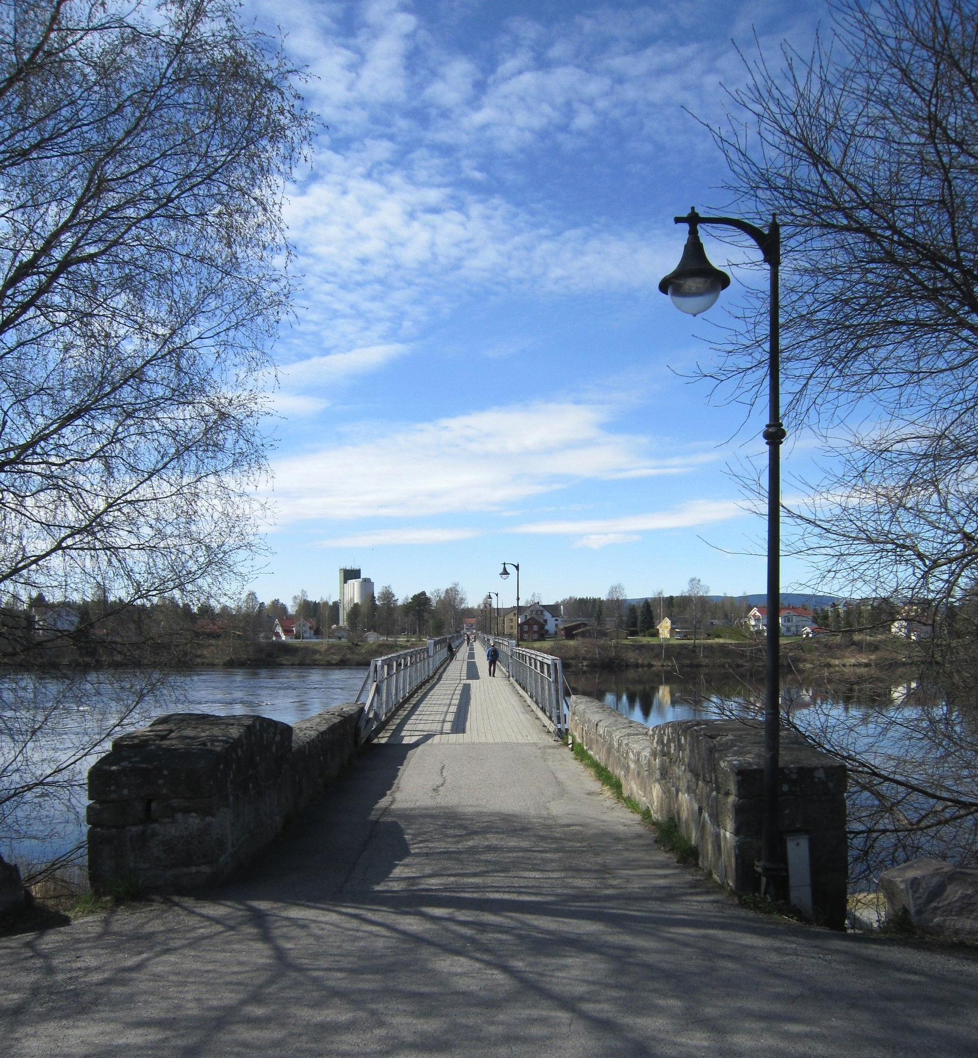 Gamlebrua i Elveum med gang- og sykkelvei